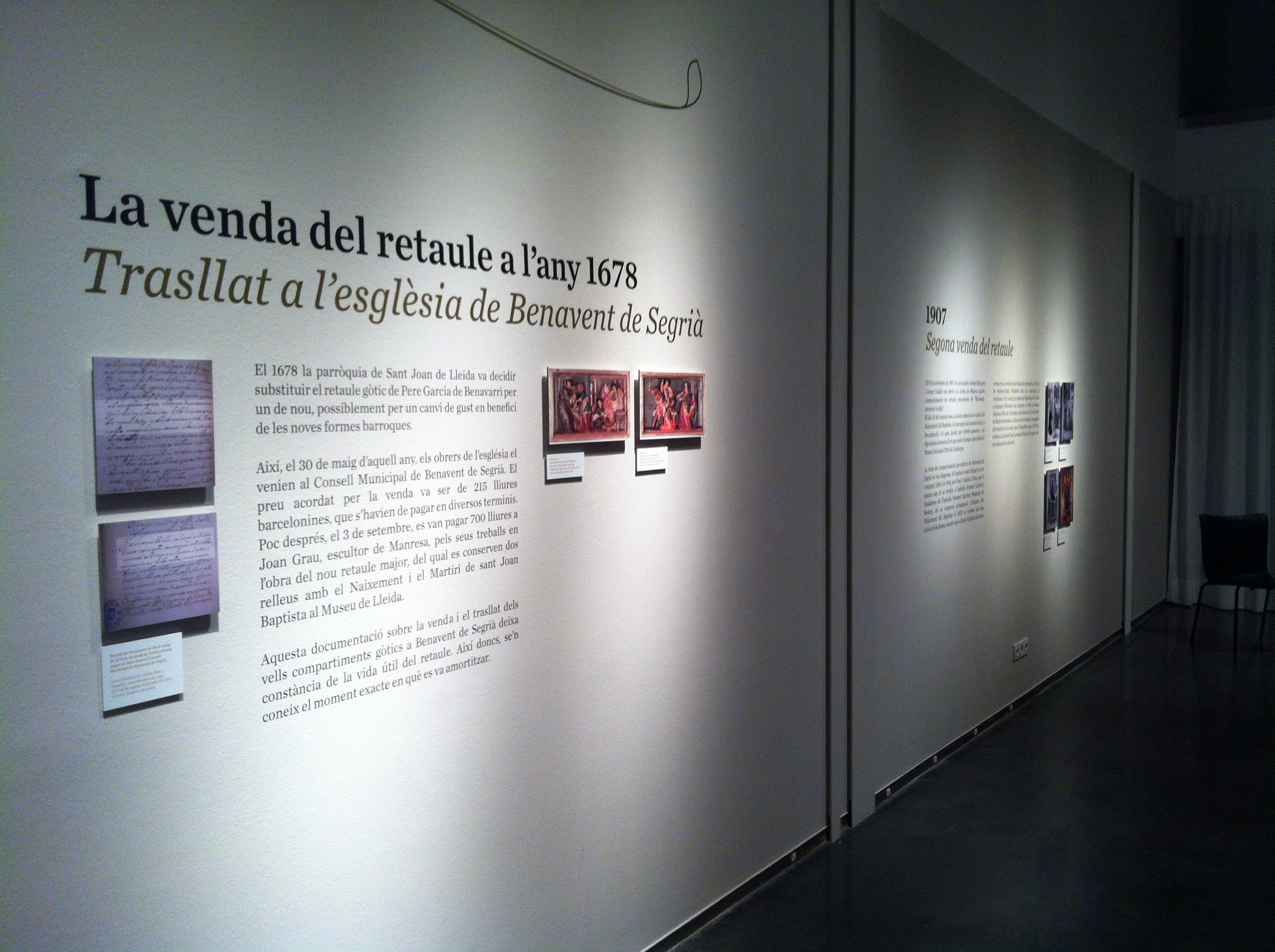 Fragments d'un passat.exosició "Fragments d'un passat. El retaule gòtic de l’església de Sant Joan de Lleida" que va tenir lloc al Museu de Lleida entre el 21 de juny i el 21 d'octubre de 2012. La mostra fou organitzada pel Museu de Lleida: diocesà i comarcal, amb la col·laboració del Museu Nacional d’Art de Catalunya (MNAC), el departament de Cultura de la Generalitat, la Diputació de Lleida, l’Obra Social “la Caixa” i Res Non Verba